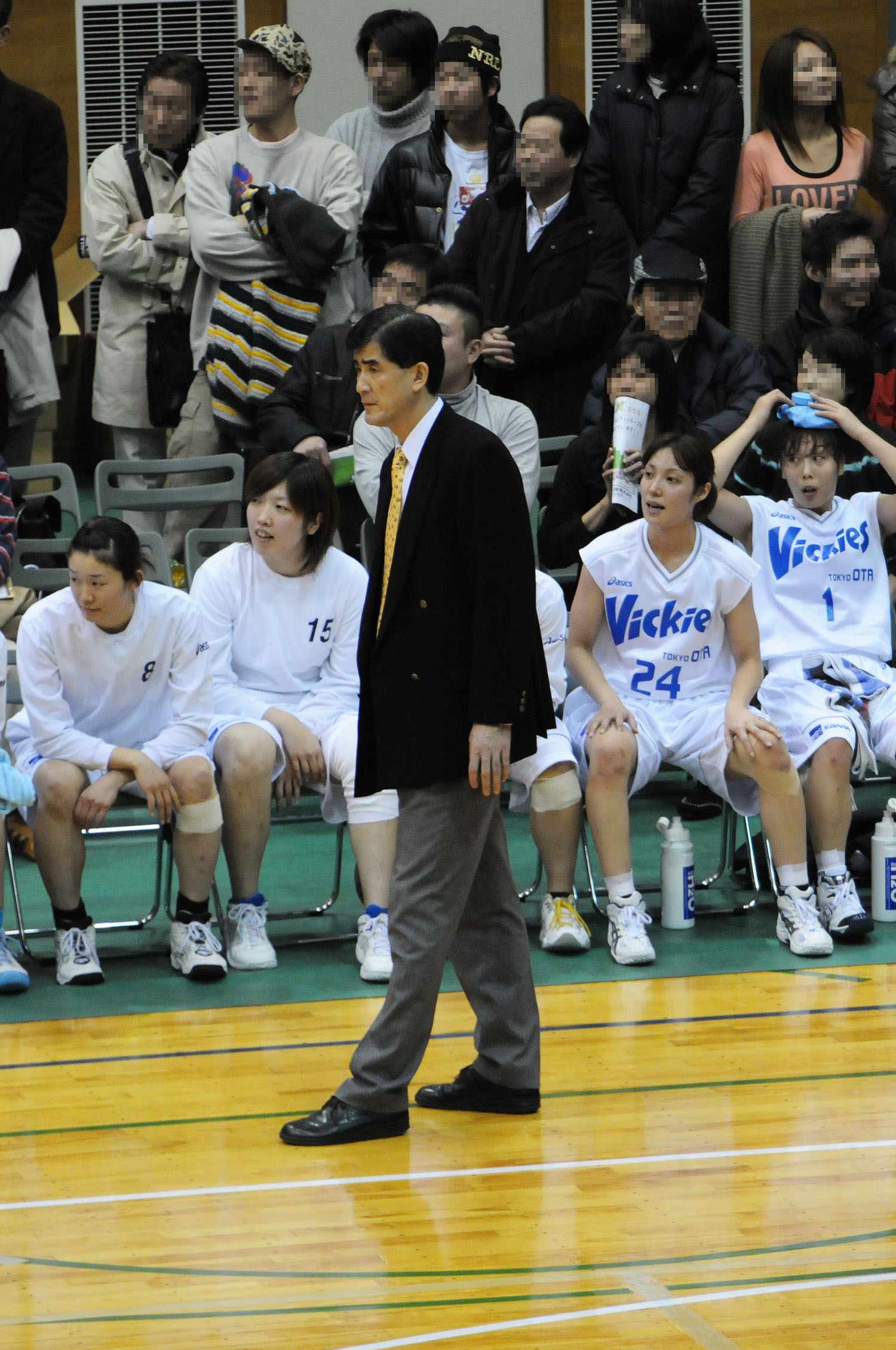 エバラヴィッキーズ、桑田健秀ヘッドコーチ。大田区立大森スポーツセンターで。